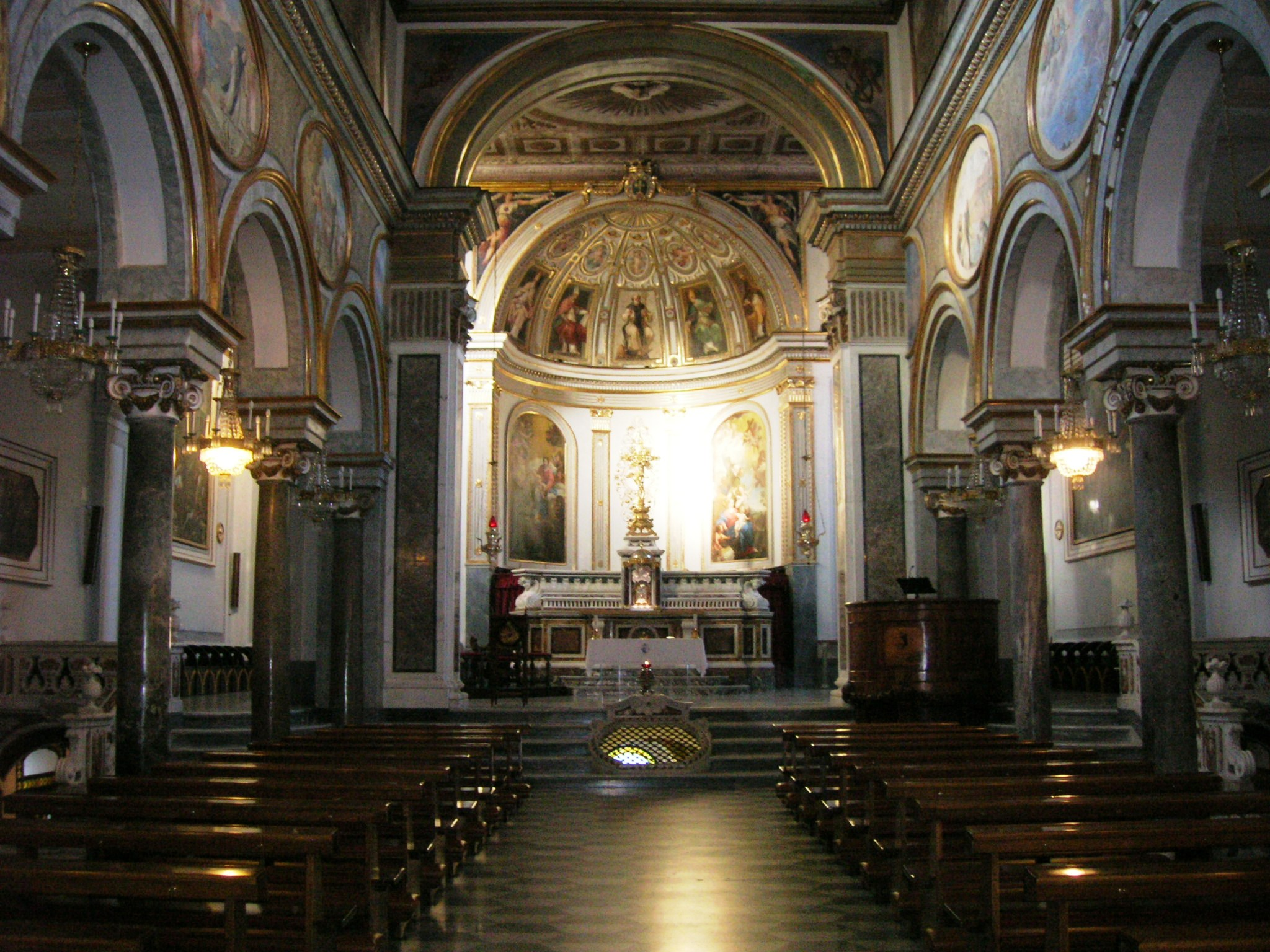 Basilica di Sant'Antonino